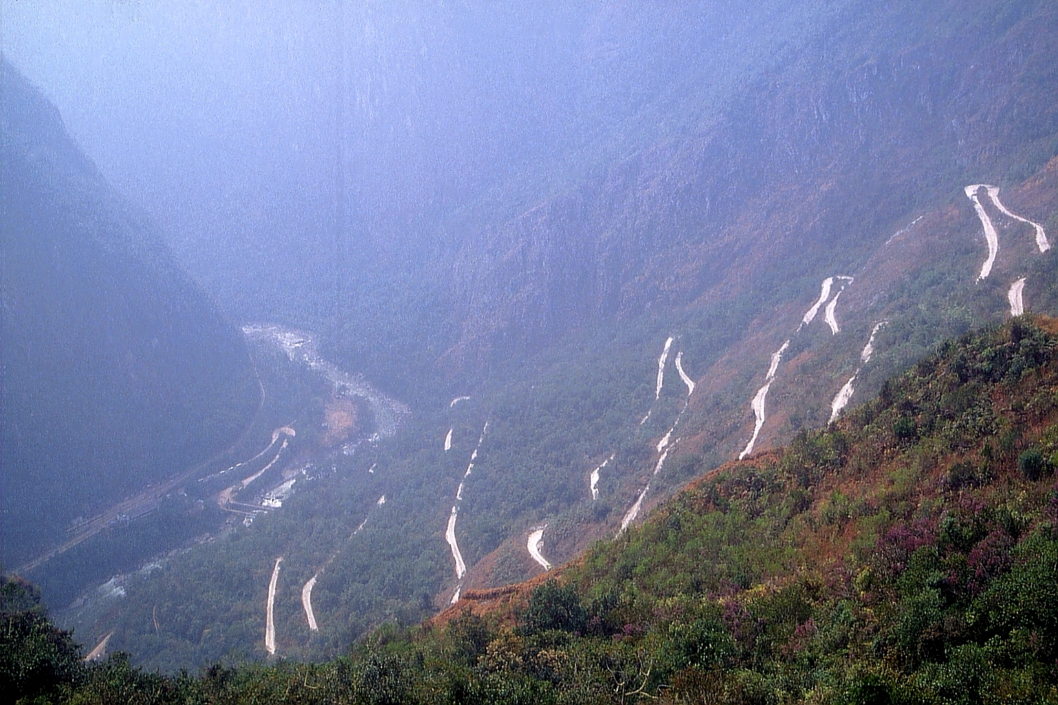 Von Aguas Calientes gelangt man per Bus oder zu Fuß über diese Serpentine nach Machu Picchu